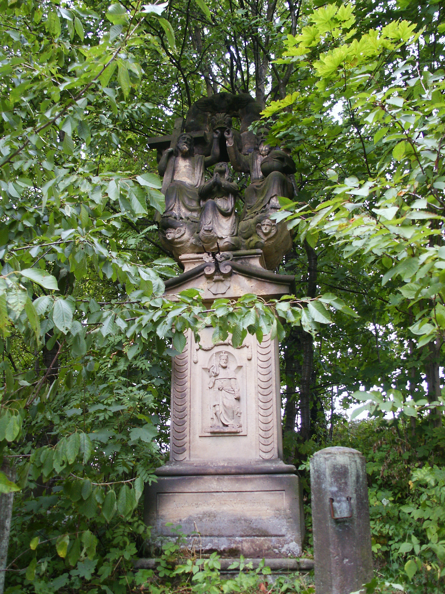 Sousoší Korunování Panny Marie, Čistá u Horek